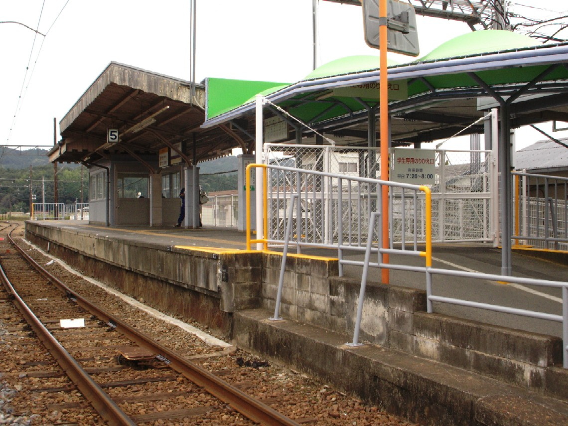 伊賀神戸駅プラットホーム